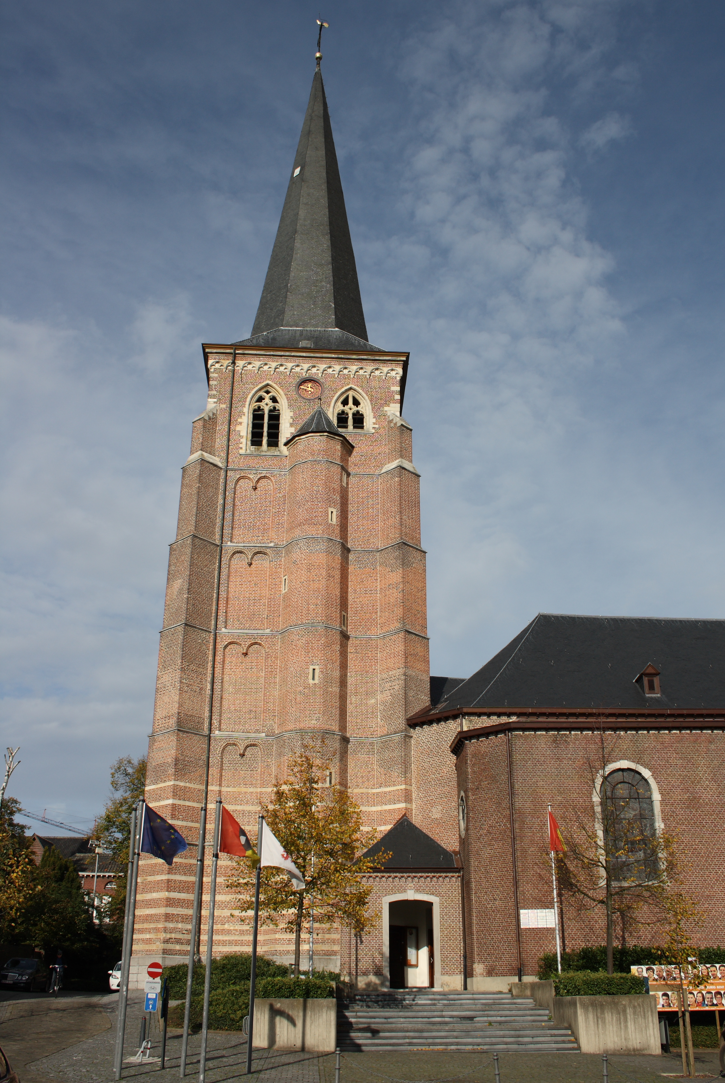 Kirche Sint-Servatius in Diepenbeek in der belgischen Region Flandern